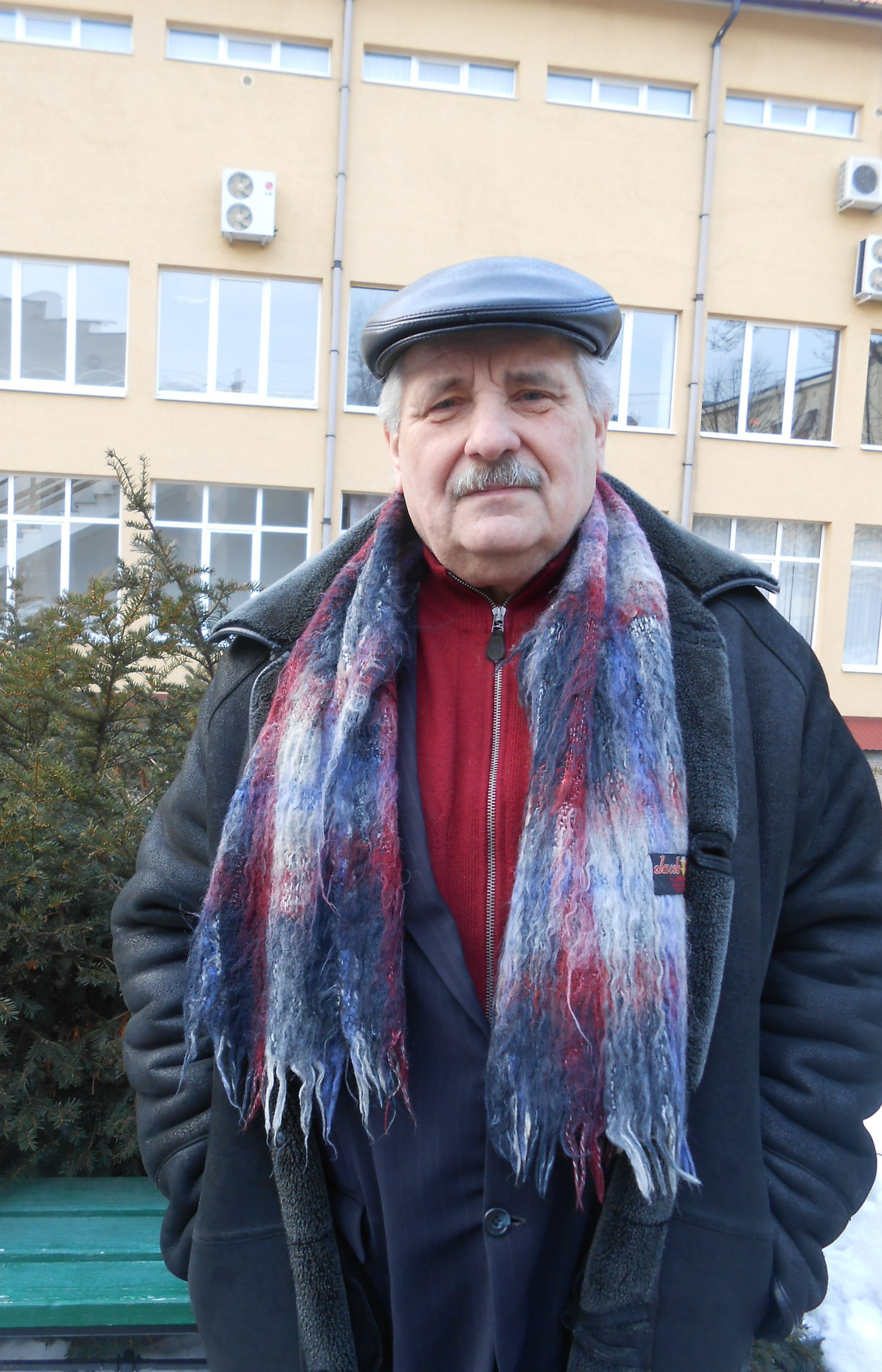 2013 рік. Івано-Франківськ.